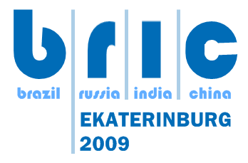 1st_BRIC_summit_logo